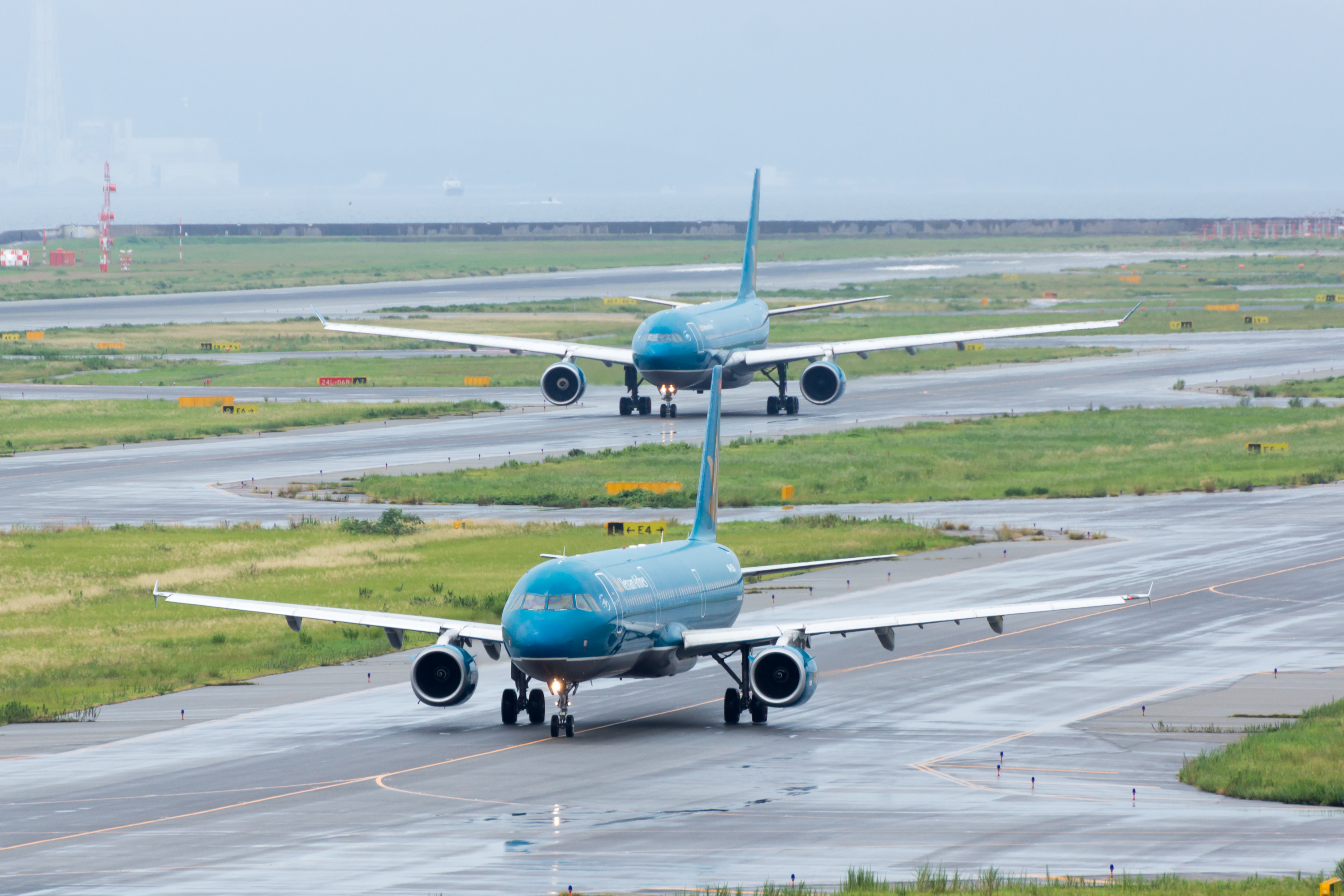 Vietnam Airlines/ Hãng hàng không Quốc gia Việt Nam/ ベトナム航空 Airbus A330-223 VN-A372 VN321, Departed to Ho Chi Minh City Osaka Kansai Int'l Airport